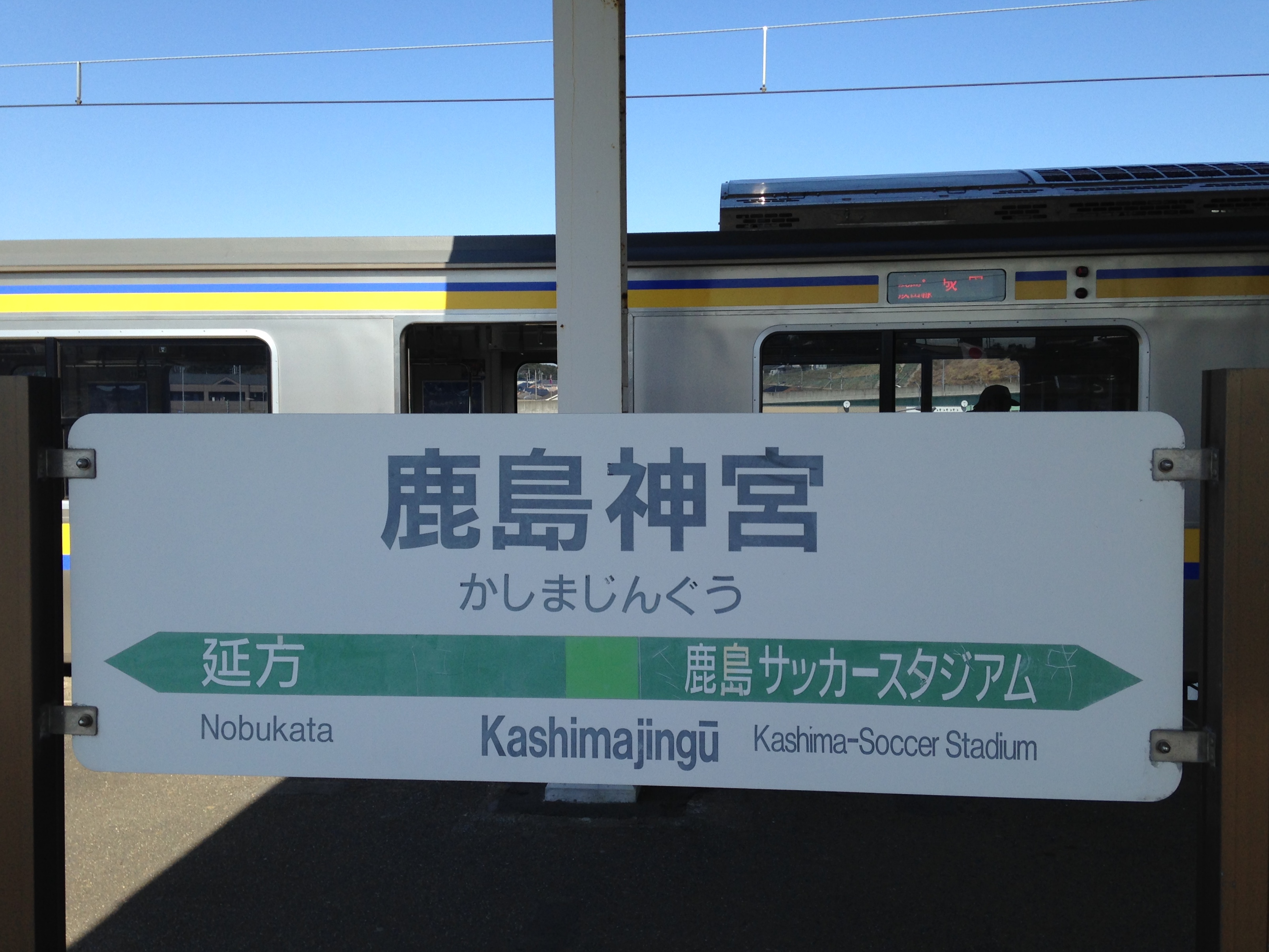 鹿島神宮駅の駅名標